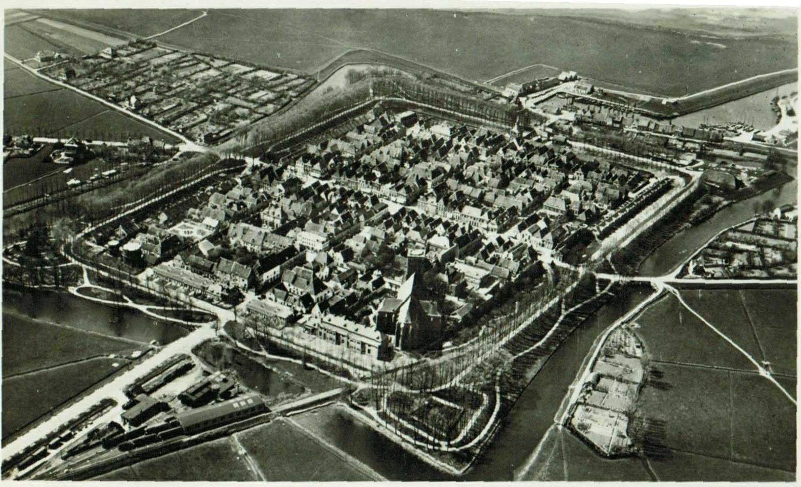 Luchtfoto van Elburg met op de voorgrond de tramremise met trams van de Zuiderzeetramweg.